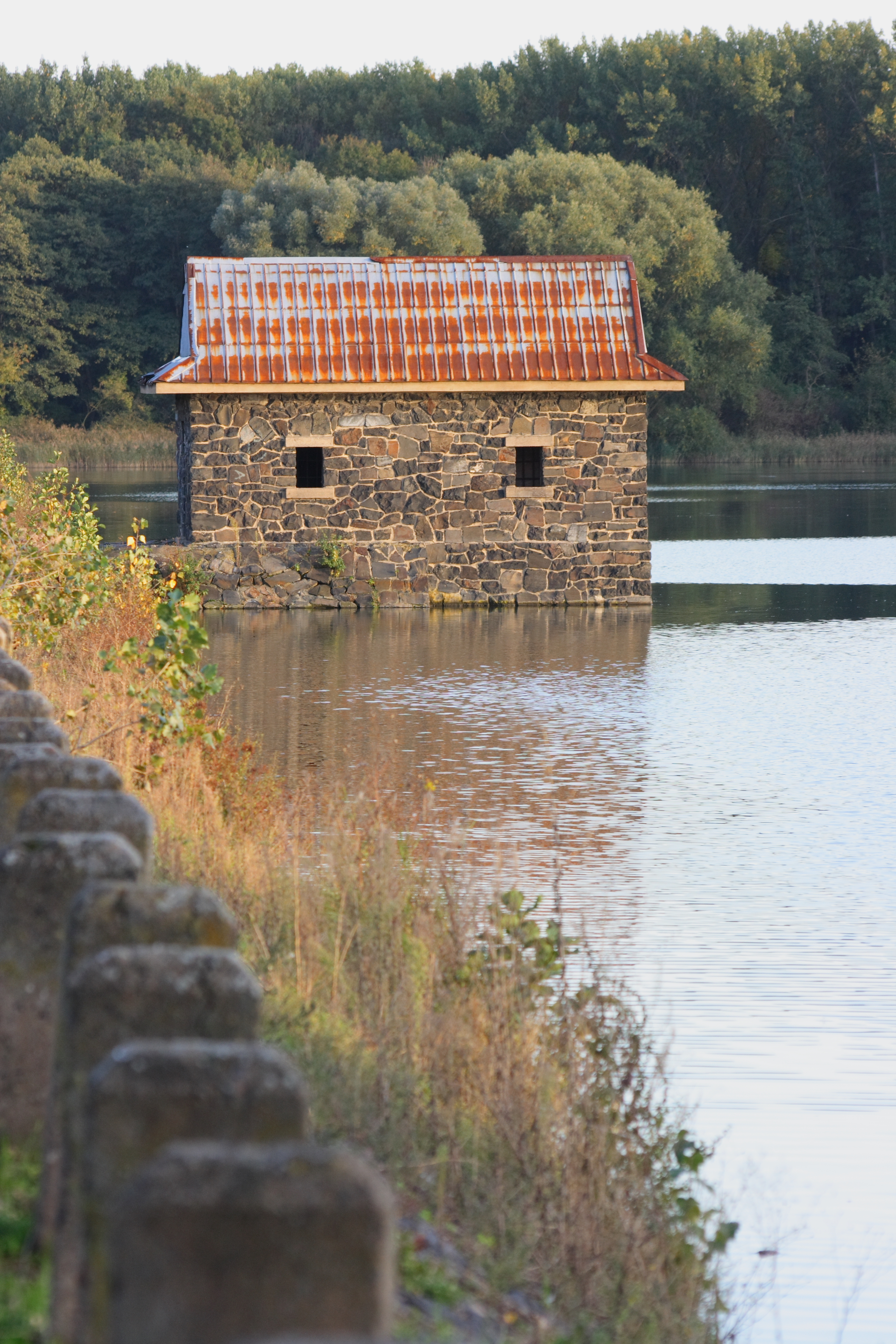 Pohled na výspustní zařízení na hrázi Litovického rybníka